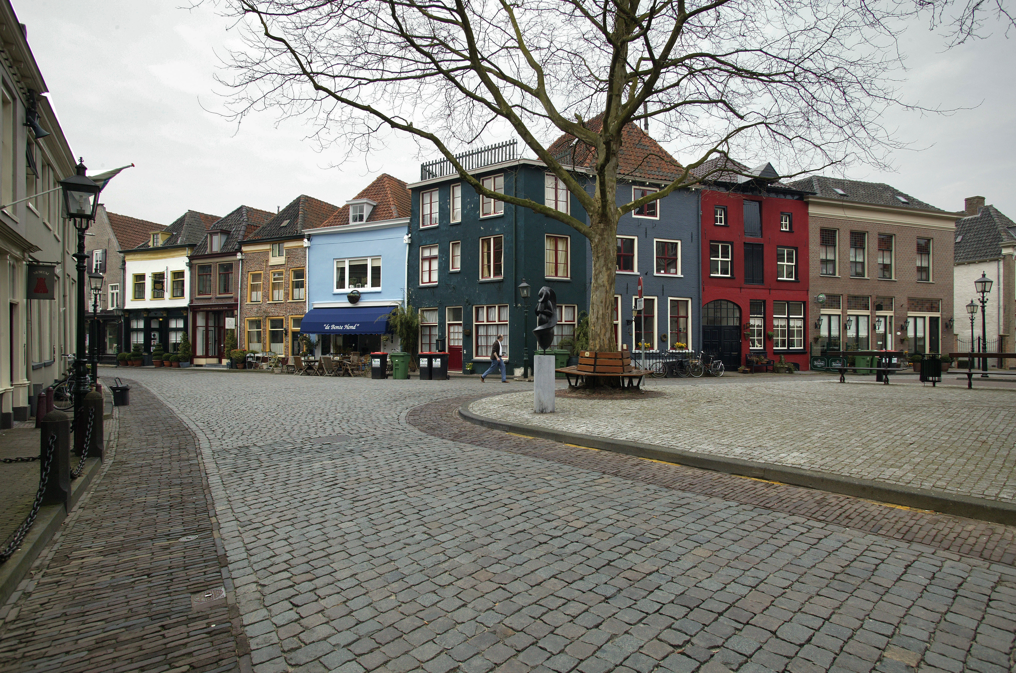 Straatbeeld, hoek Roggestraat - Philip Gastelaarsstraat